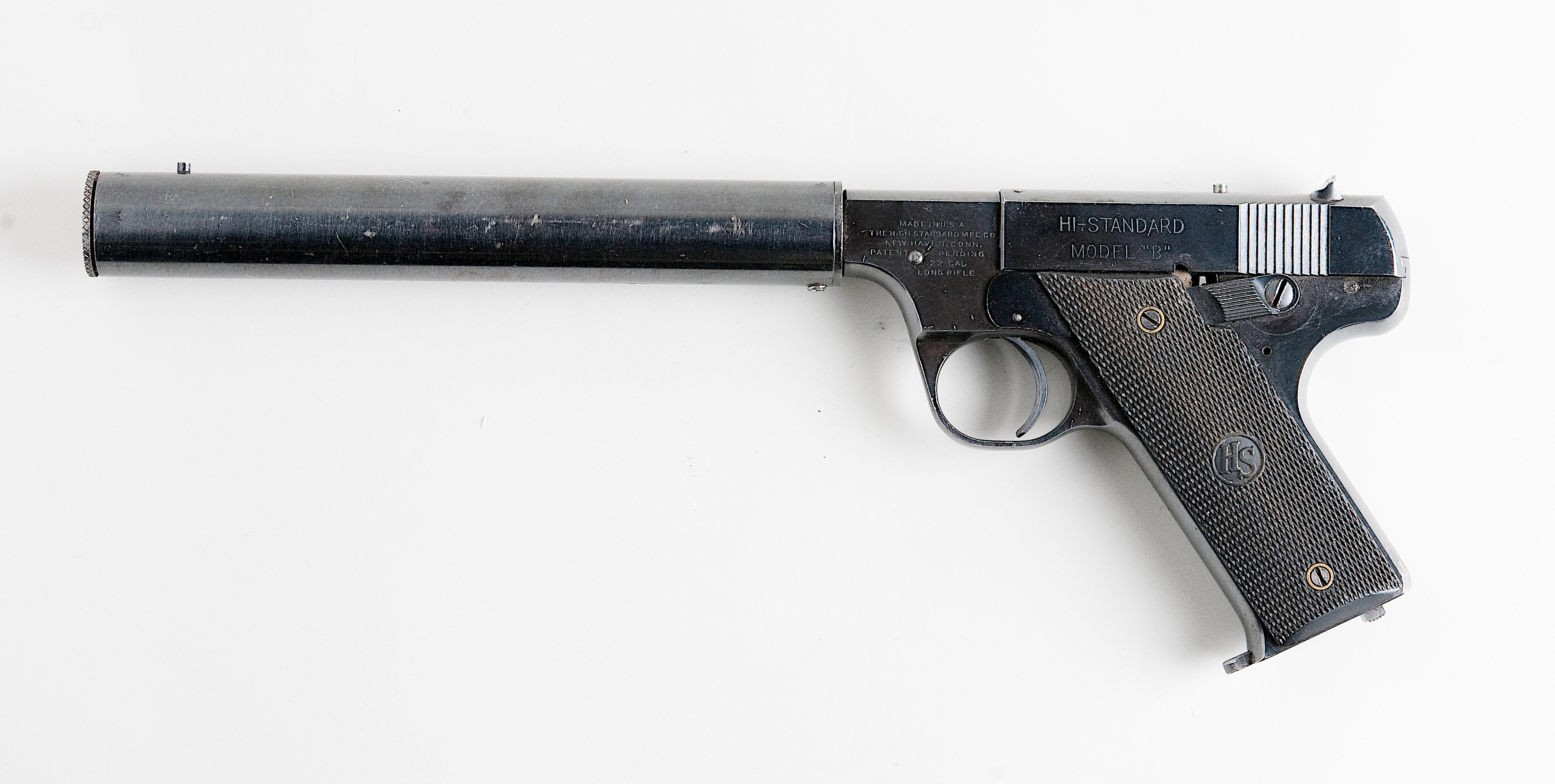 Hi standard B lydd From flickr user handvapensamlingen - Pistols used in Norway.